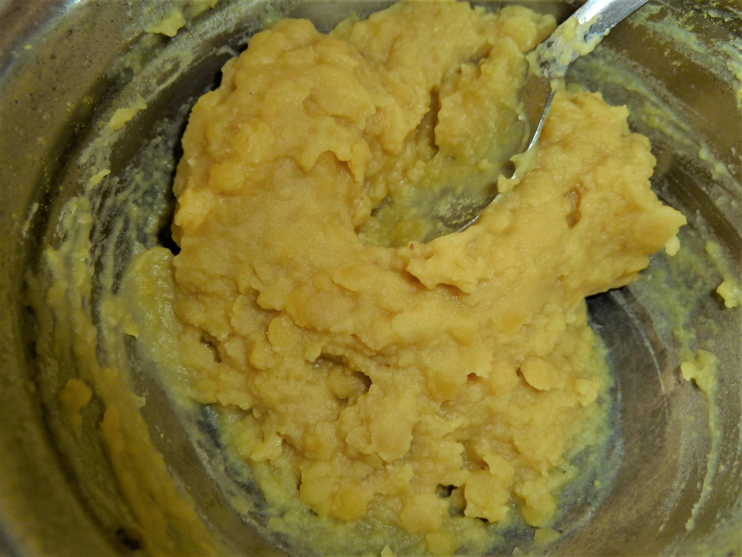 కందిపప్పు ముద్దపప్పు